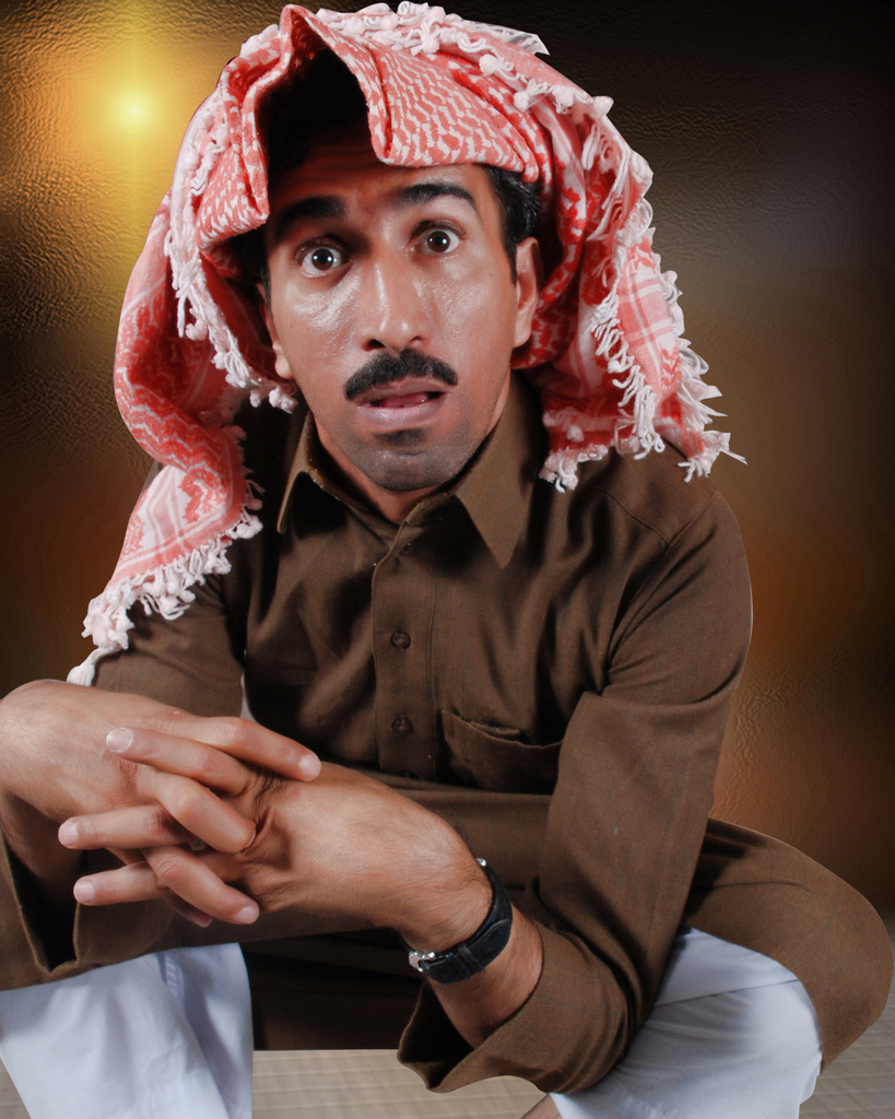 Saudi Arabia Actors Fayez Al-Malki.